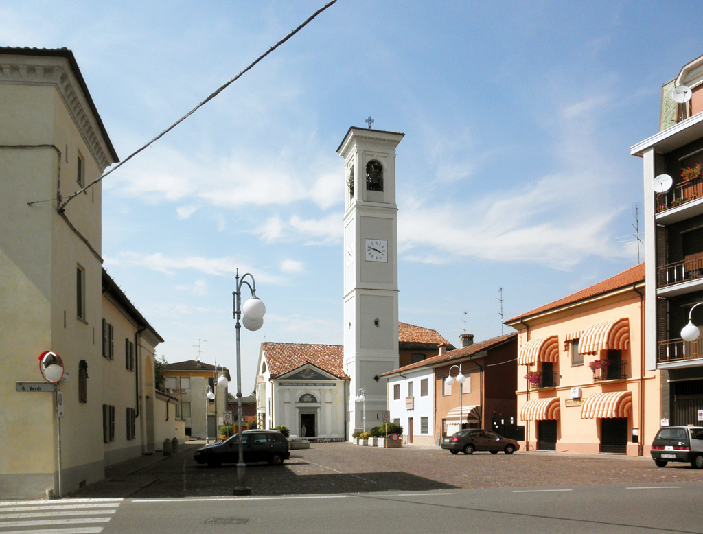 Piazza Maggiore a Salerano sul Lambro